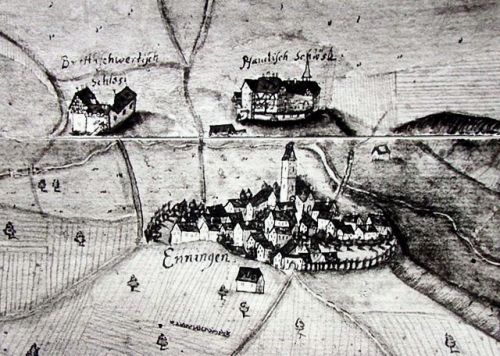 Kiesersche Forstkarte, Detail zu Ehningen